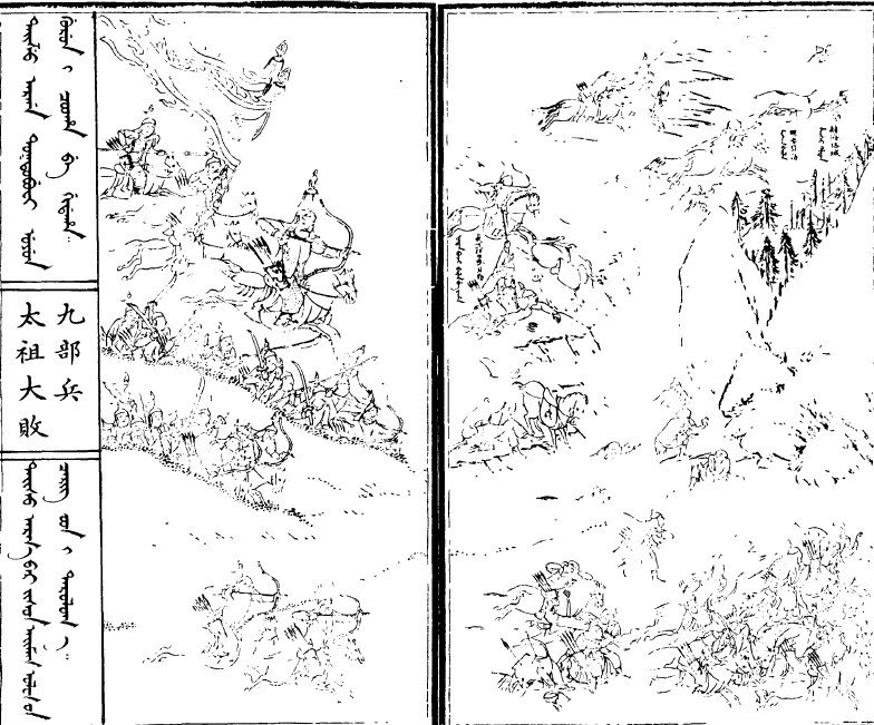 选自《满洲实录》